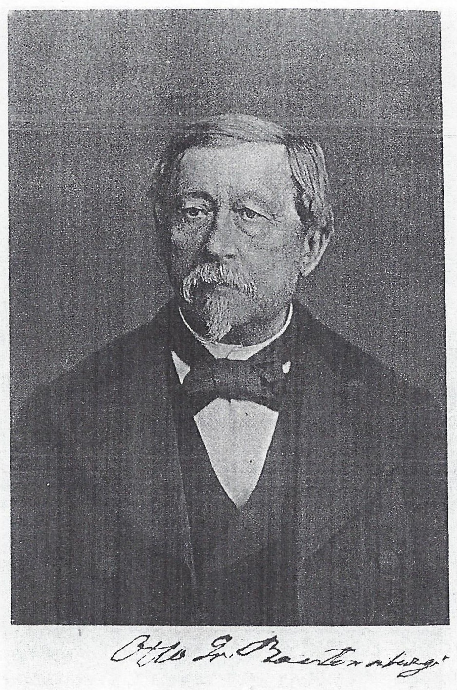 Signierte Porträtfotografie von Reichsgraf Otto von Keyserlingk zu Rautenberg (1802-1885)